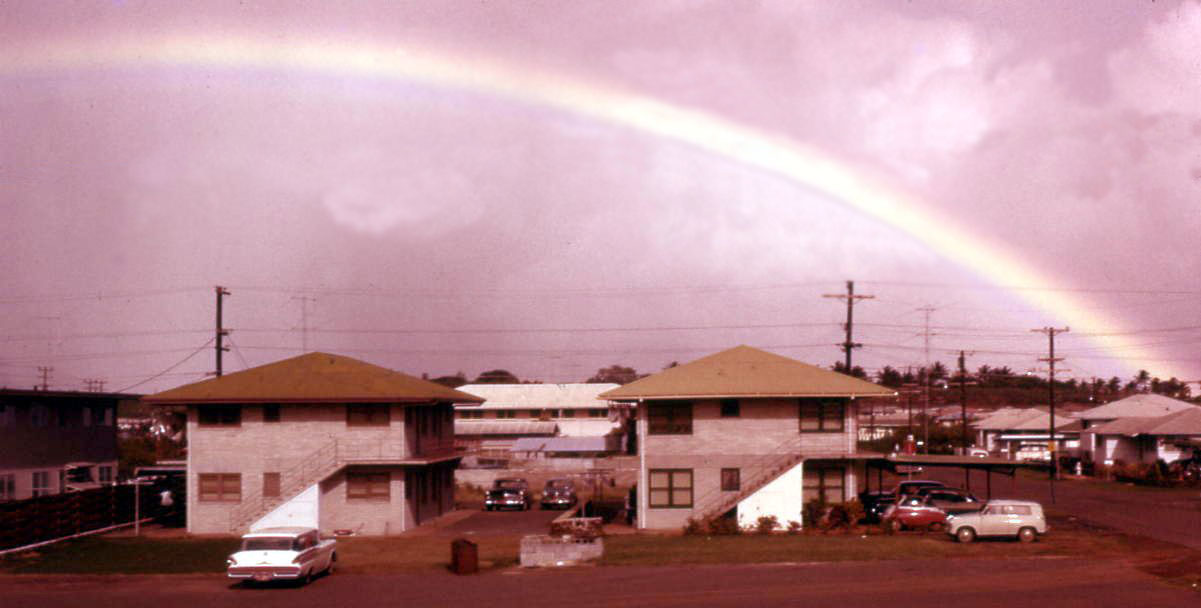 Rainbow over Waipahu, Oahu, Hawaii, 1958